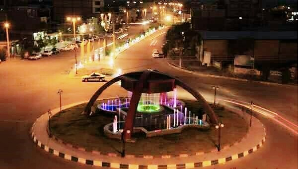 نمای غربی شهر قلعه گنج - میدان ولی عصر